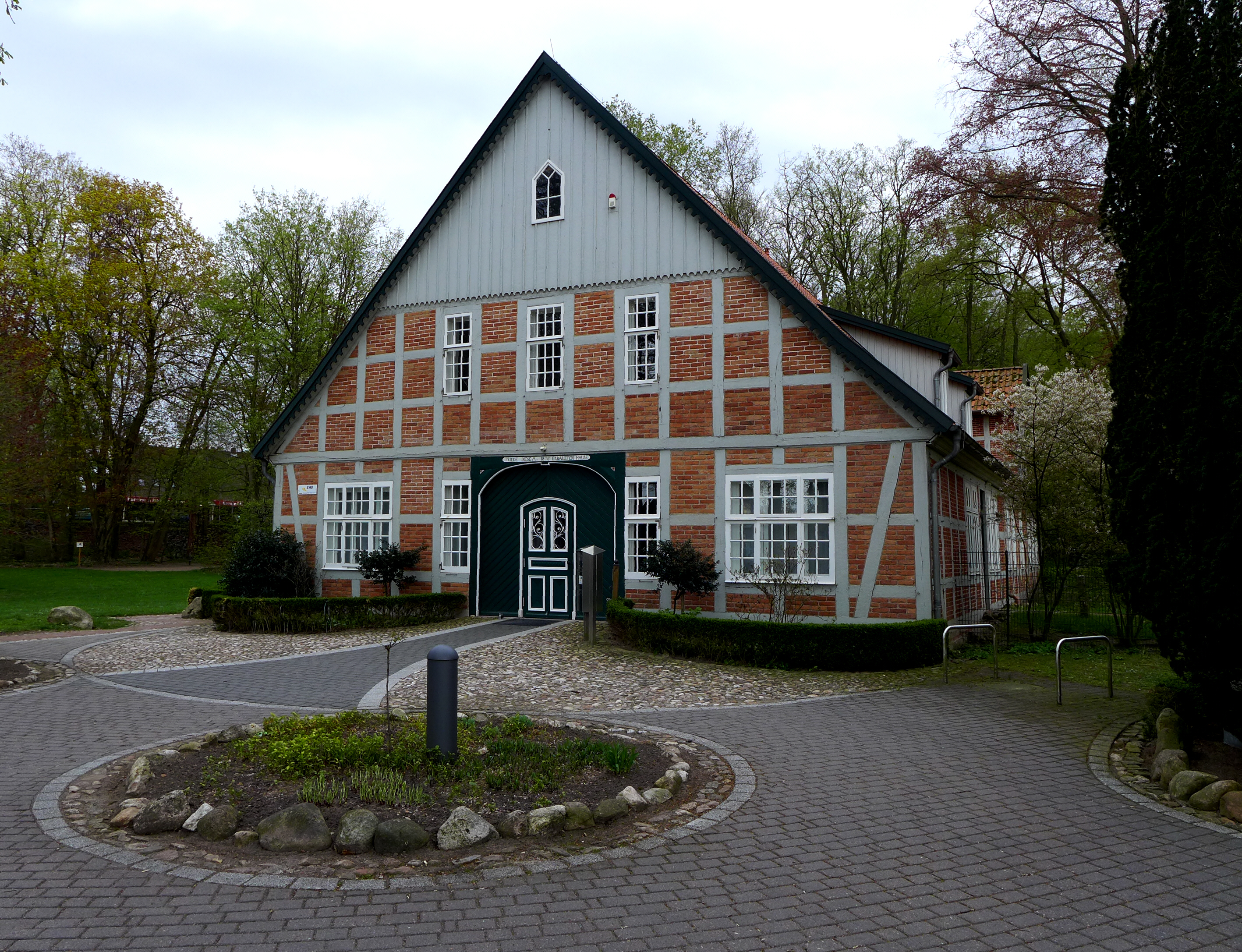 Im Jahre 1839 brannte das ursprüngliche Gebäude der Amtsvogtei auf dem Gelände des heutigen Rathauses ab. Im Jahre 1841 erwarb das Königreich Hannover das abgebildete Anwesen an der Mühlenstraße von Scheeßel als neue Amtsvogtei. Heute hat der Energieversorger EWE AG hier seinen Sitz und stellt einen Teil der Räumlichkeiten des Gebäudes für kulturelle Zwecke zur Verfügung.